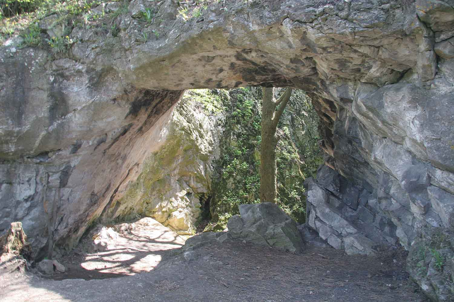 Axamitova brána na severním úpatí Kotýzu v Českém krasu.